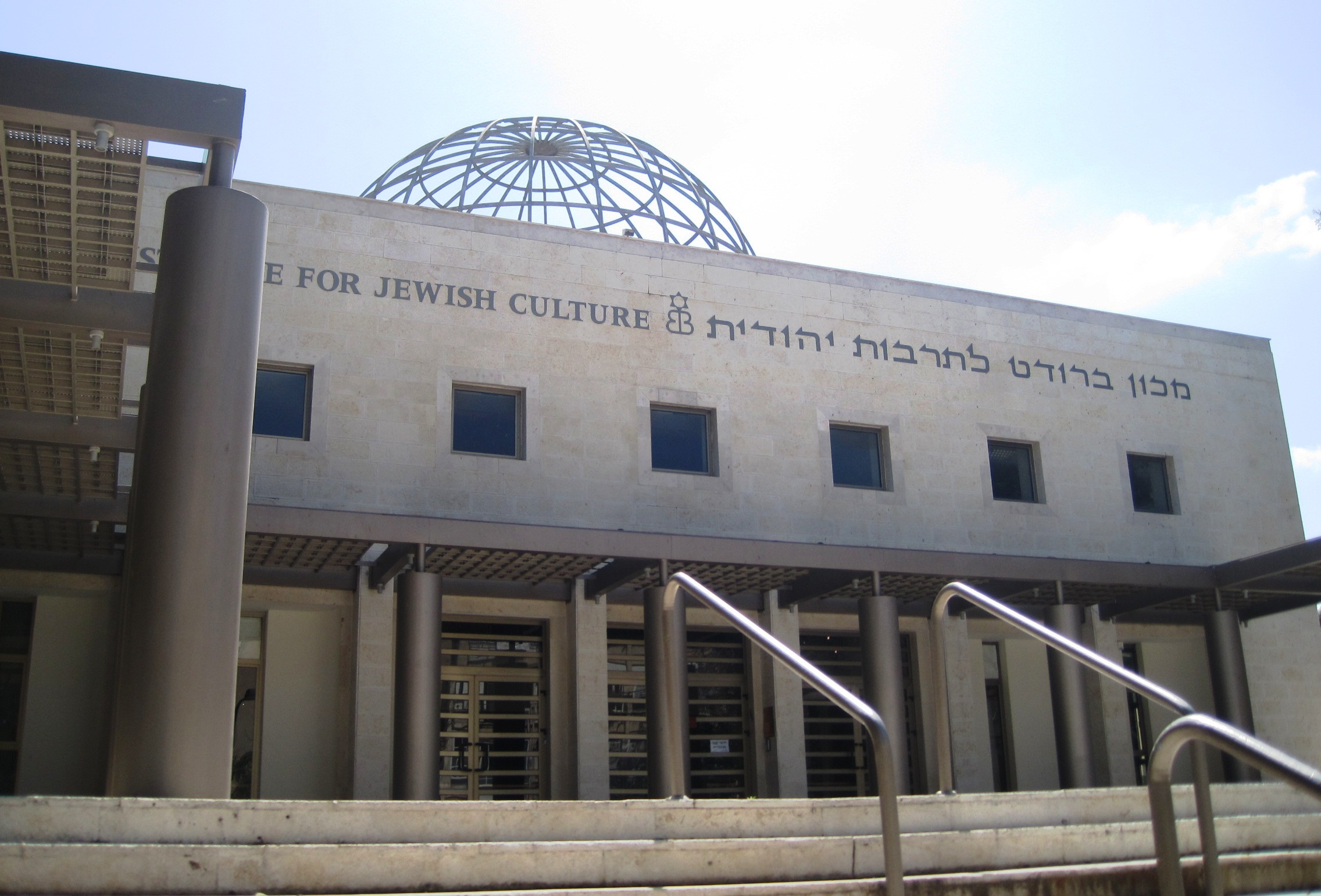 מכון תל אביב לחזנות